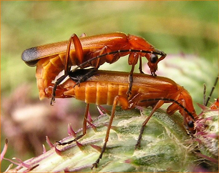 couple de Coléoptères Rhagonycha fulva